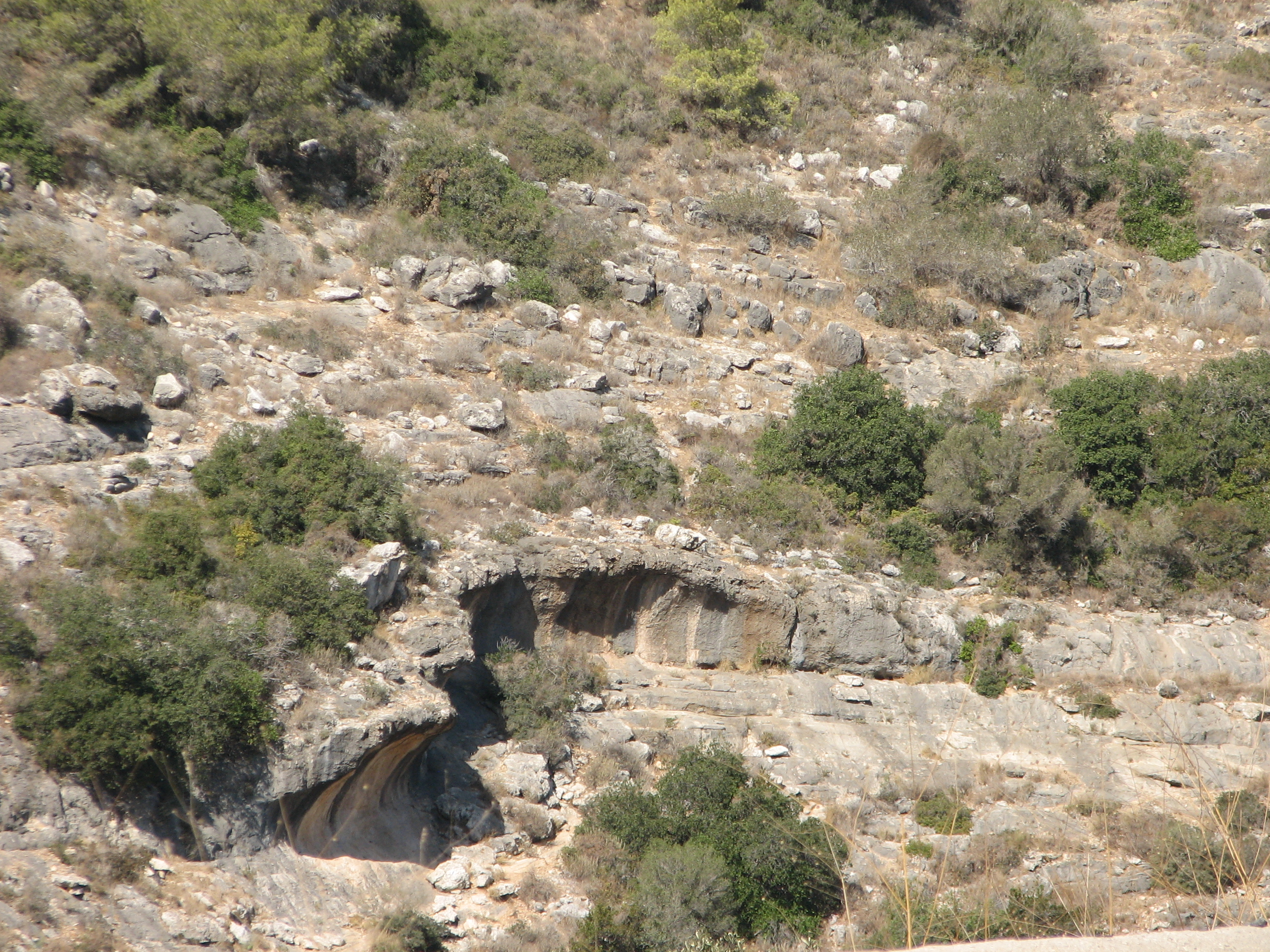 Oren Wadi - Mount Carmel Israel, Notch נחל אורן זורם בהר הכרמל צניר בנחל אורן